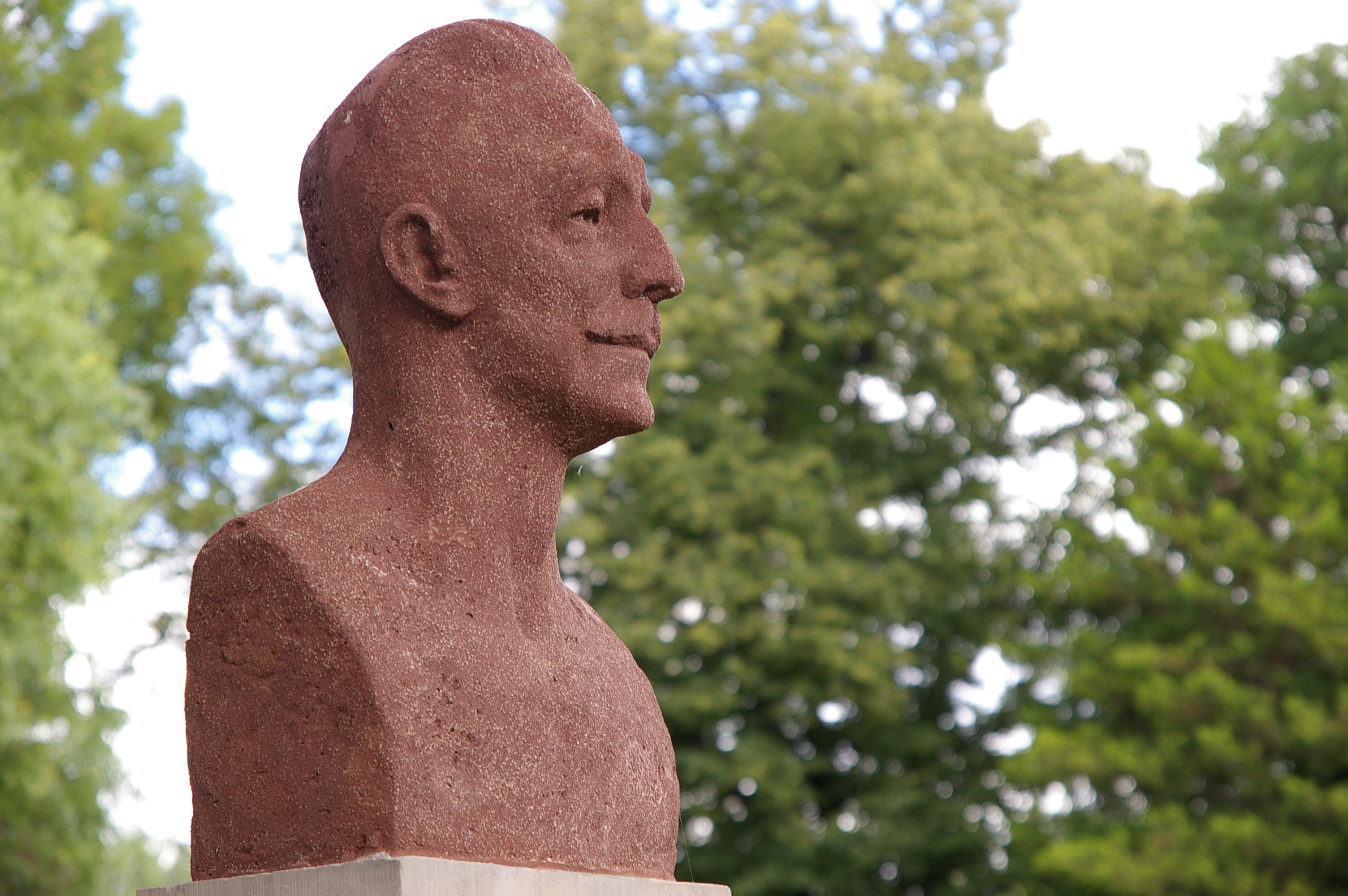 Grób Jana Czeraszkiewicza na Starym Cmentarzu w Łodzi